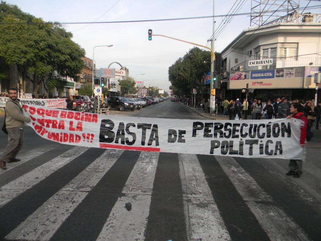 Manifestantes expresandose en favor de la democracia, Buenos aires, Argentina.